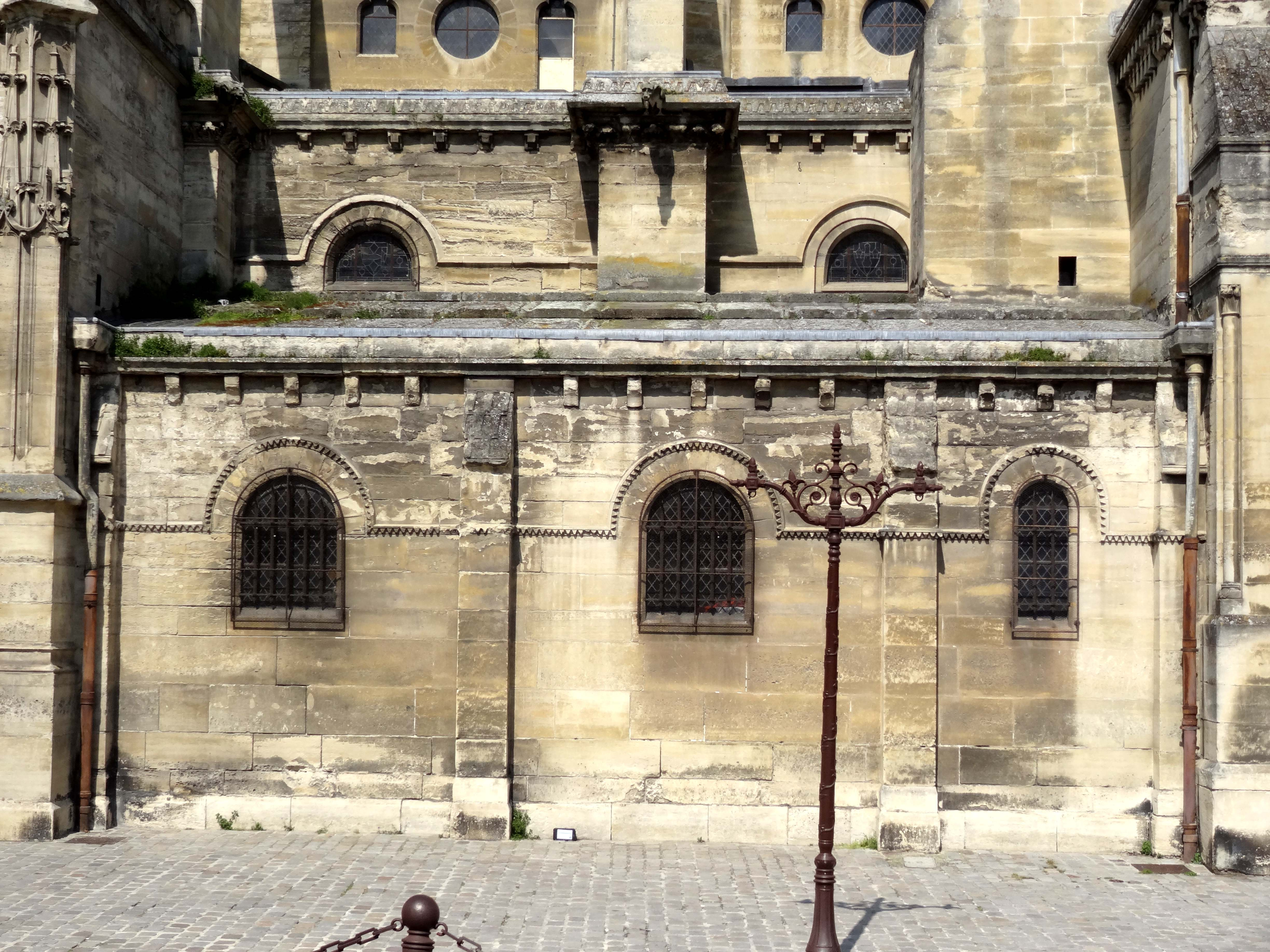 Collégiale Notre-Dame de Poissy - voir titre.